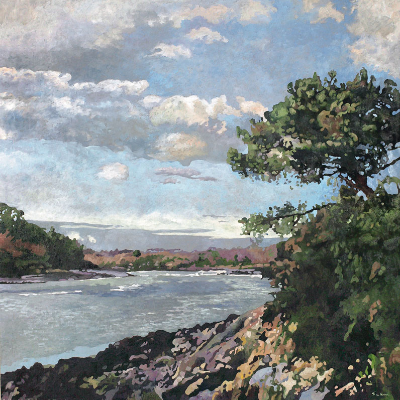 The other shore